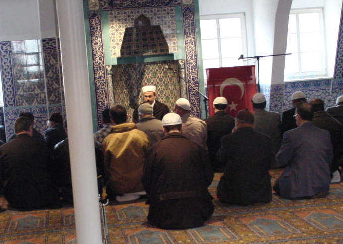 Türken beim Gebet in einer Moschee in Biberach an der Riß. Eigenes Foto von The weaver 16:47, 17. Apr 2004 (CEST) zu Pressezwecken mit Genehmigung aufgenommen im März 2003. Zur Verfügung gestellt von Weberberg.de, der Website für Biberach. GNU-FDL.